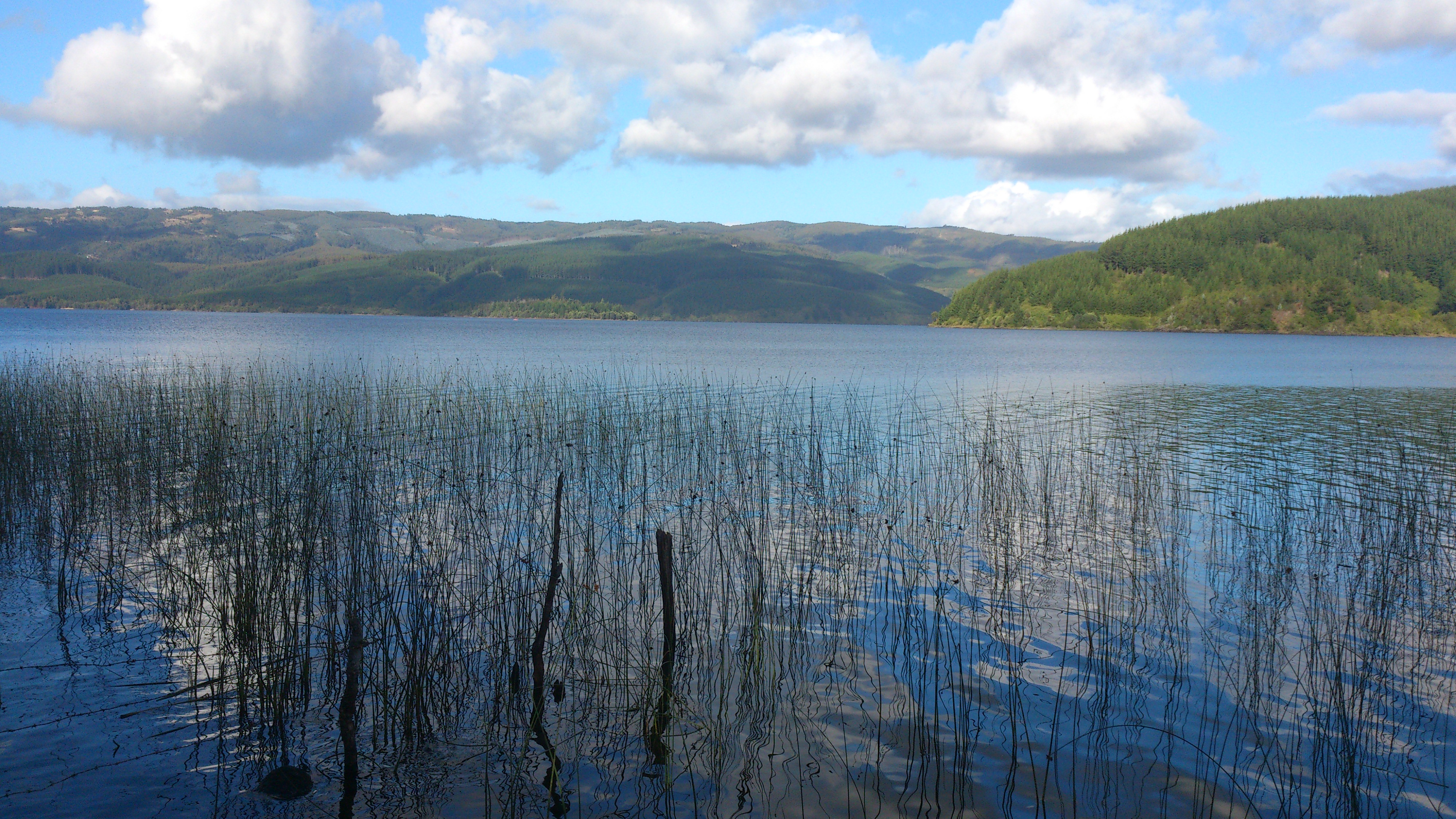 vista del Lago Lleu Lleu, ubicado en la Region del Bio Bio.Considerado uno de los lagos mas limpios de Sudamerica